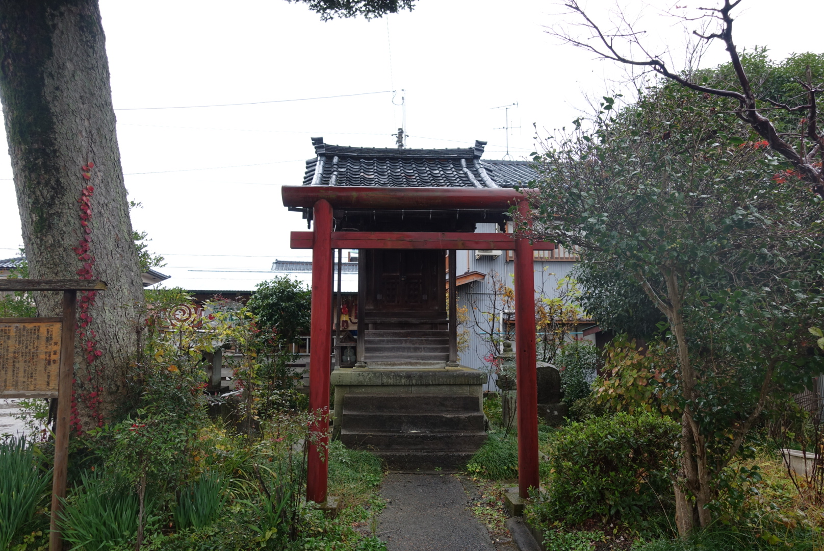 福井県福井市地蔵院にある河濯堂